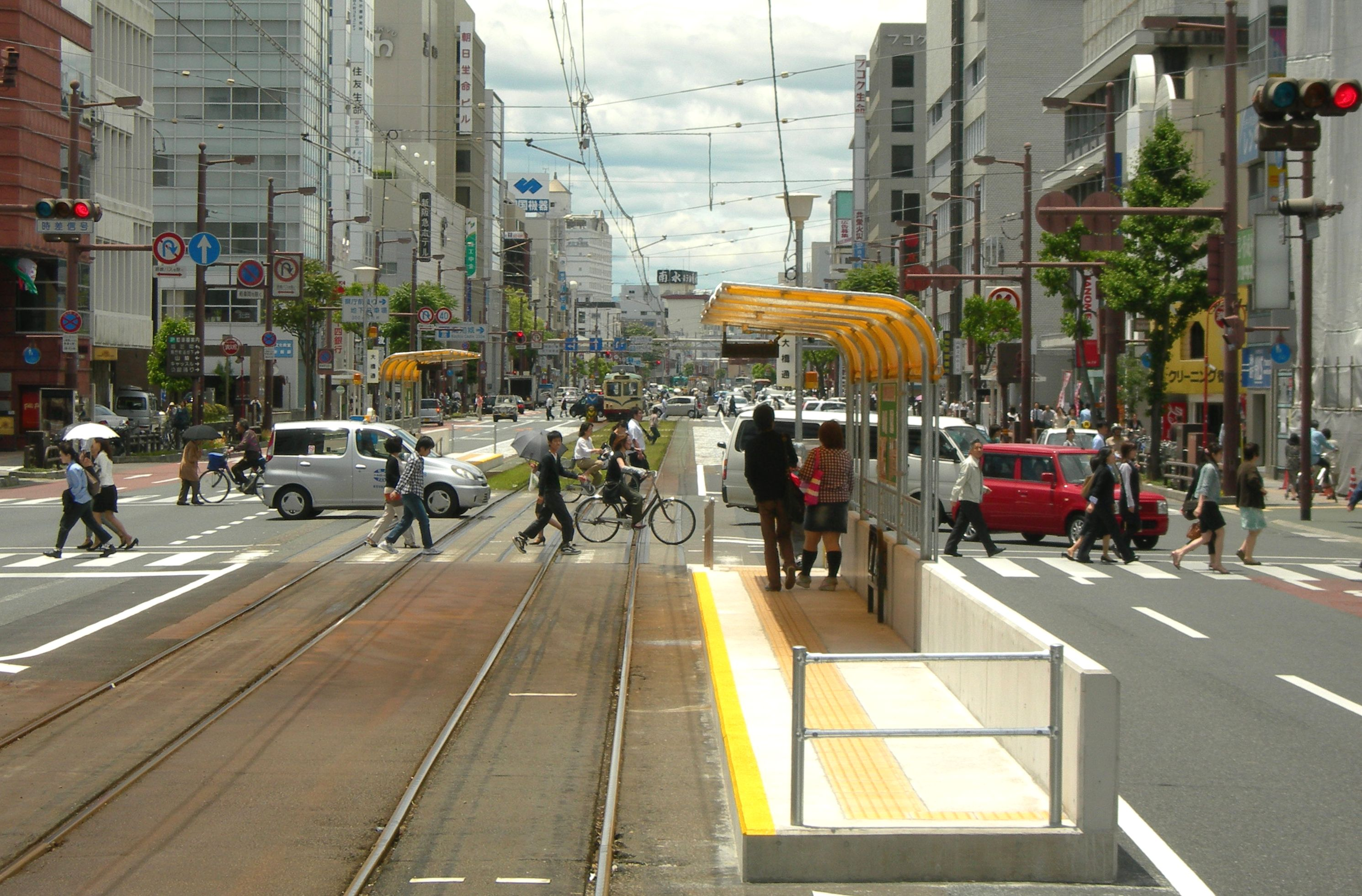 土佐電気鉄道・大橋通電停